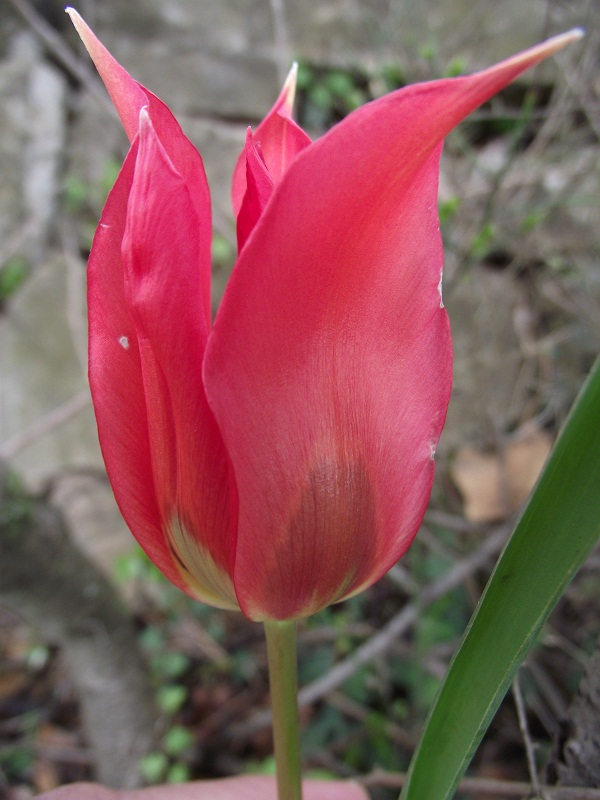 Tulipa agenensis DC. 1804, Liliaceae